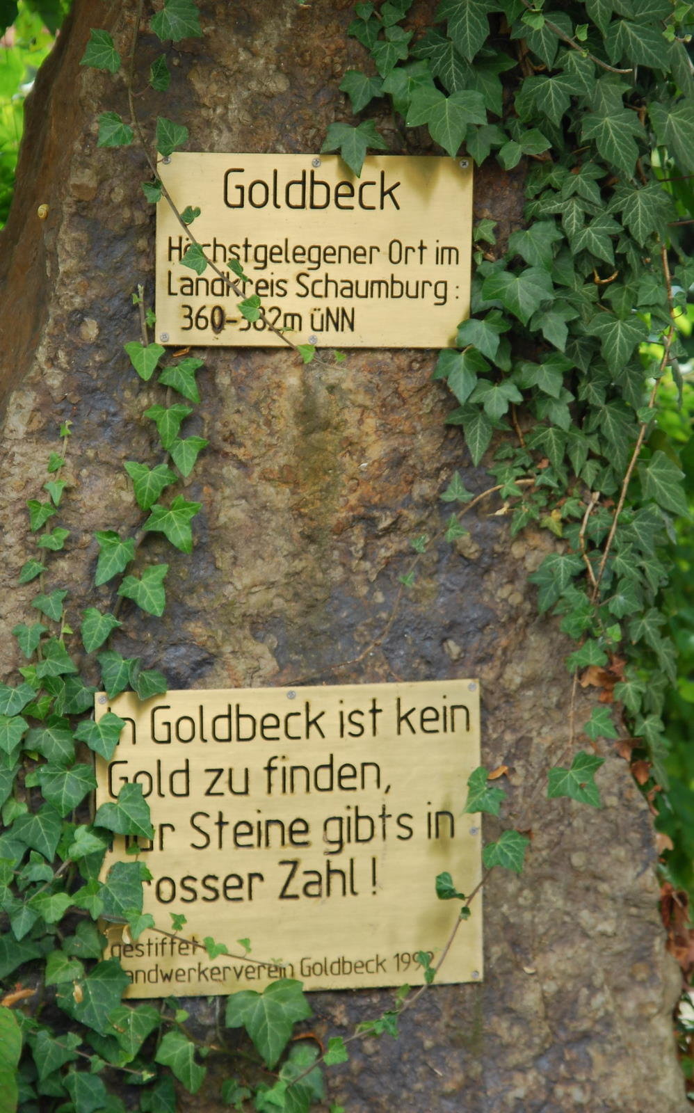 Gedenkstein in Goldebeck